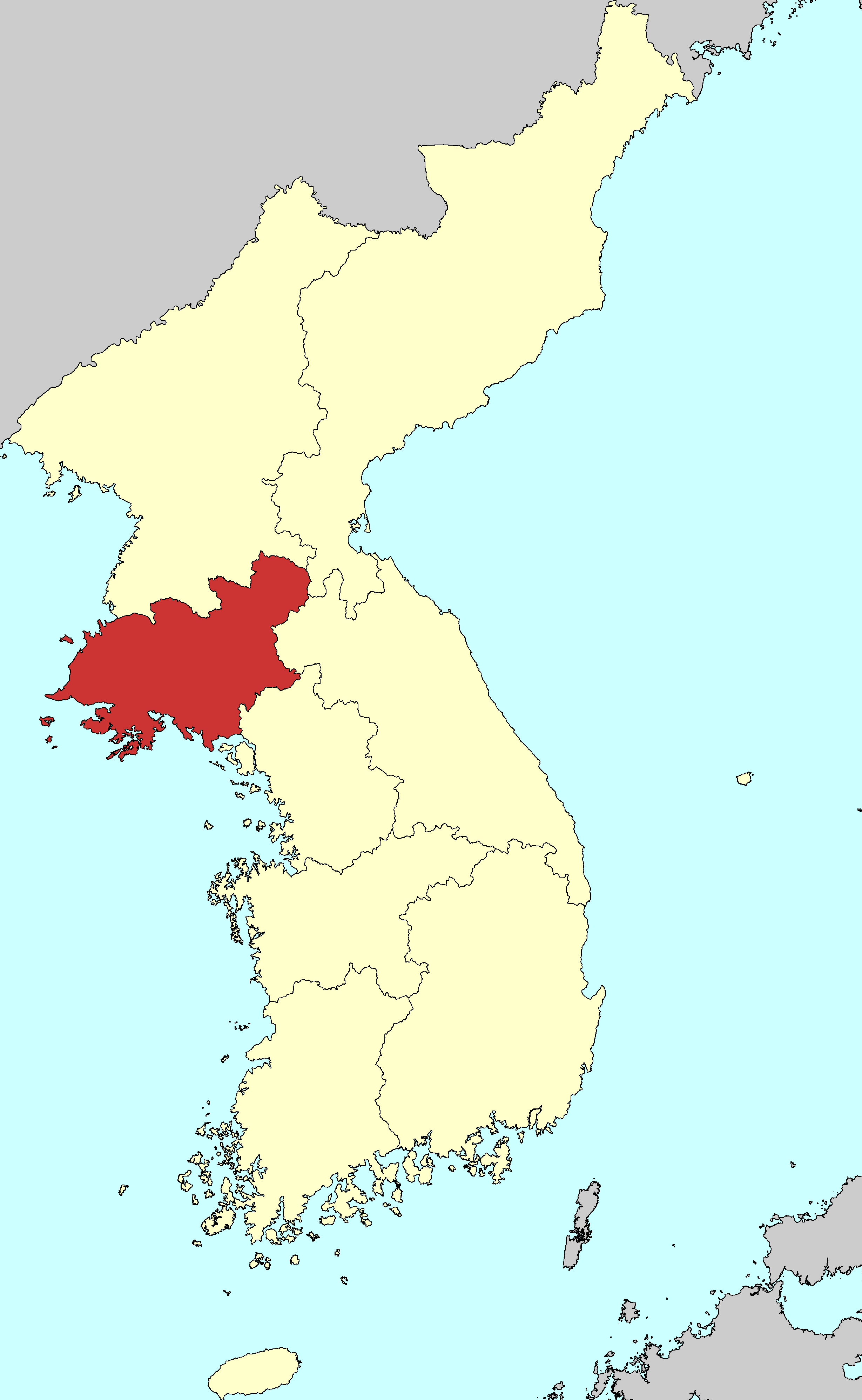 조선후기 황해도